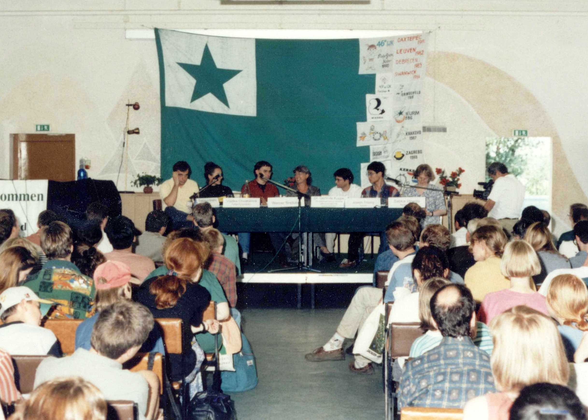 IJK 1996 en Güntersberge. Diskuto kun ministrino Gerlinde Kuppe.